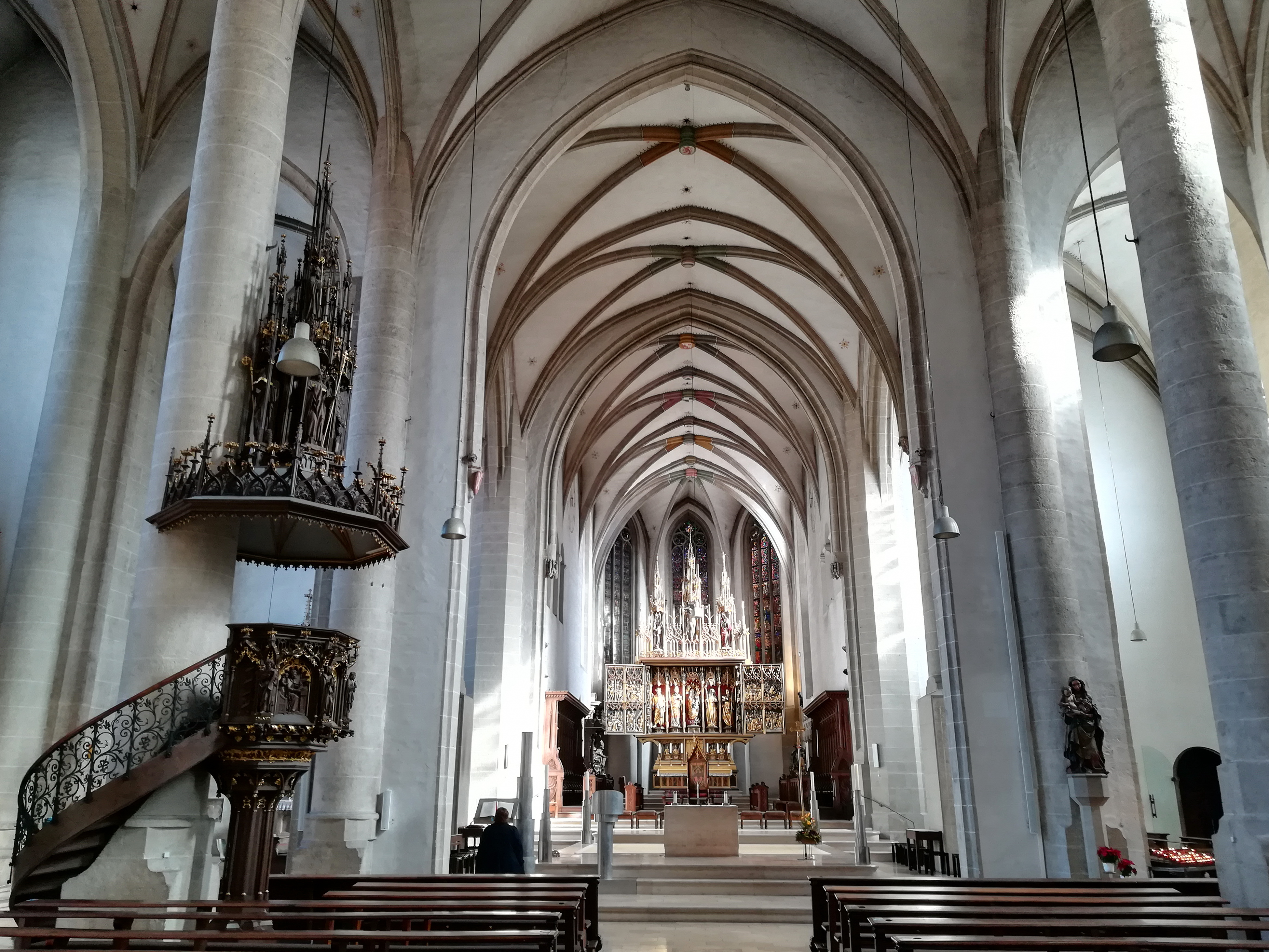 Der Dom zu Eichstätt (St. Salvator, U.L. Frau und St. Willibald) ist die Kathedralkirche des katholischen Bistums Eichstätt in Eichstätt.